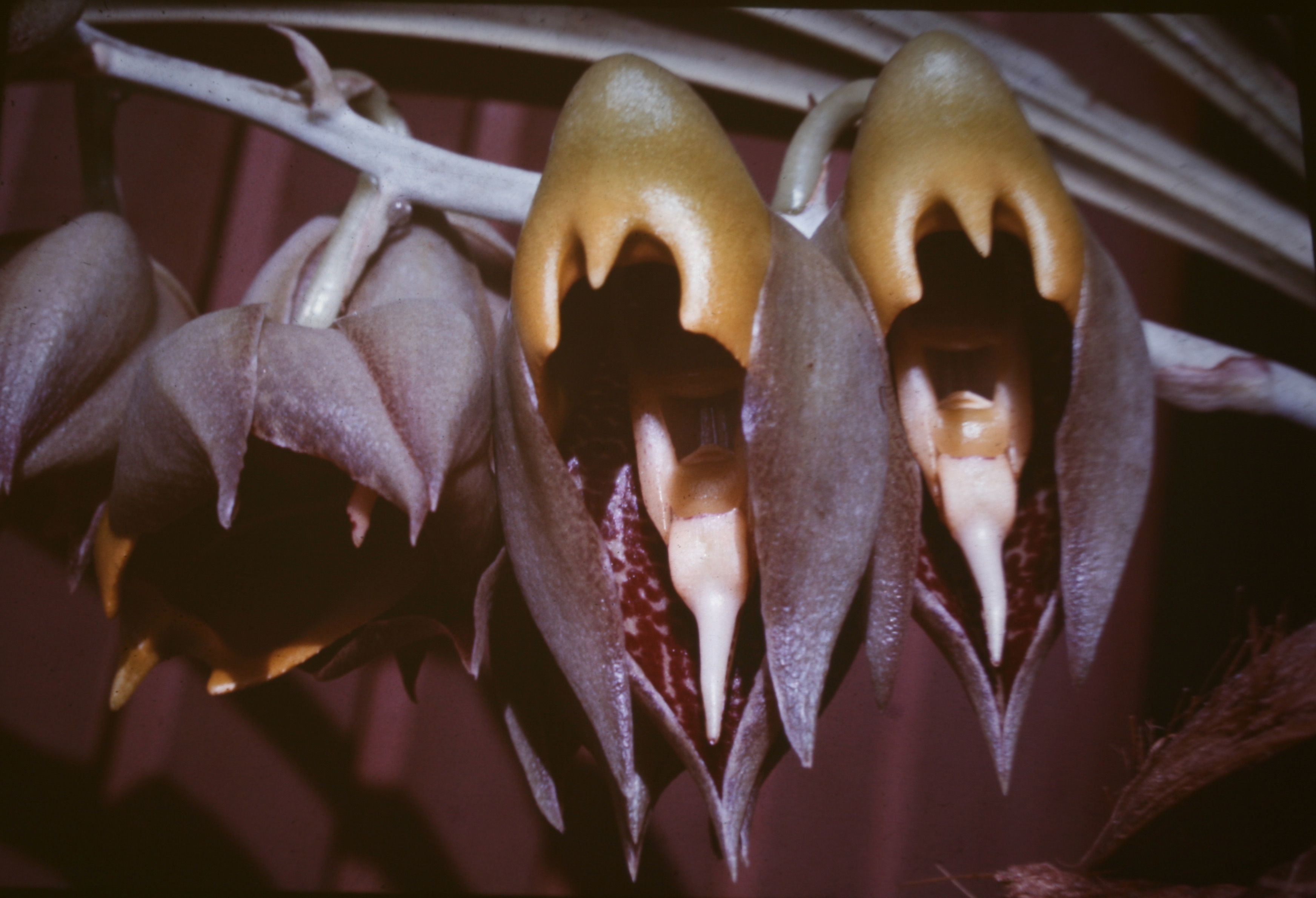 Catasetum macrocarpum. Suriname.